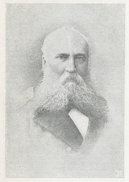 Данное изображение было использовано в статье «Пилкин, Константин Павлович» опубликованной во восемнадцатом томе «Военной энциклопедии», который был издан книгоиздательским товариществом Ивана Дмитриевича Сытина в 1915 году в столице Российской империи городе Санкт-Петербурге.